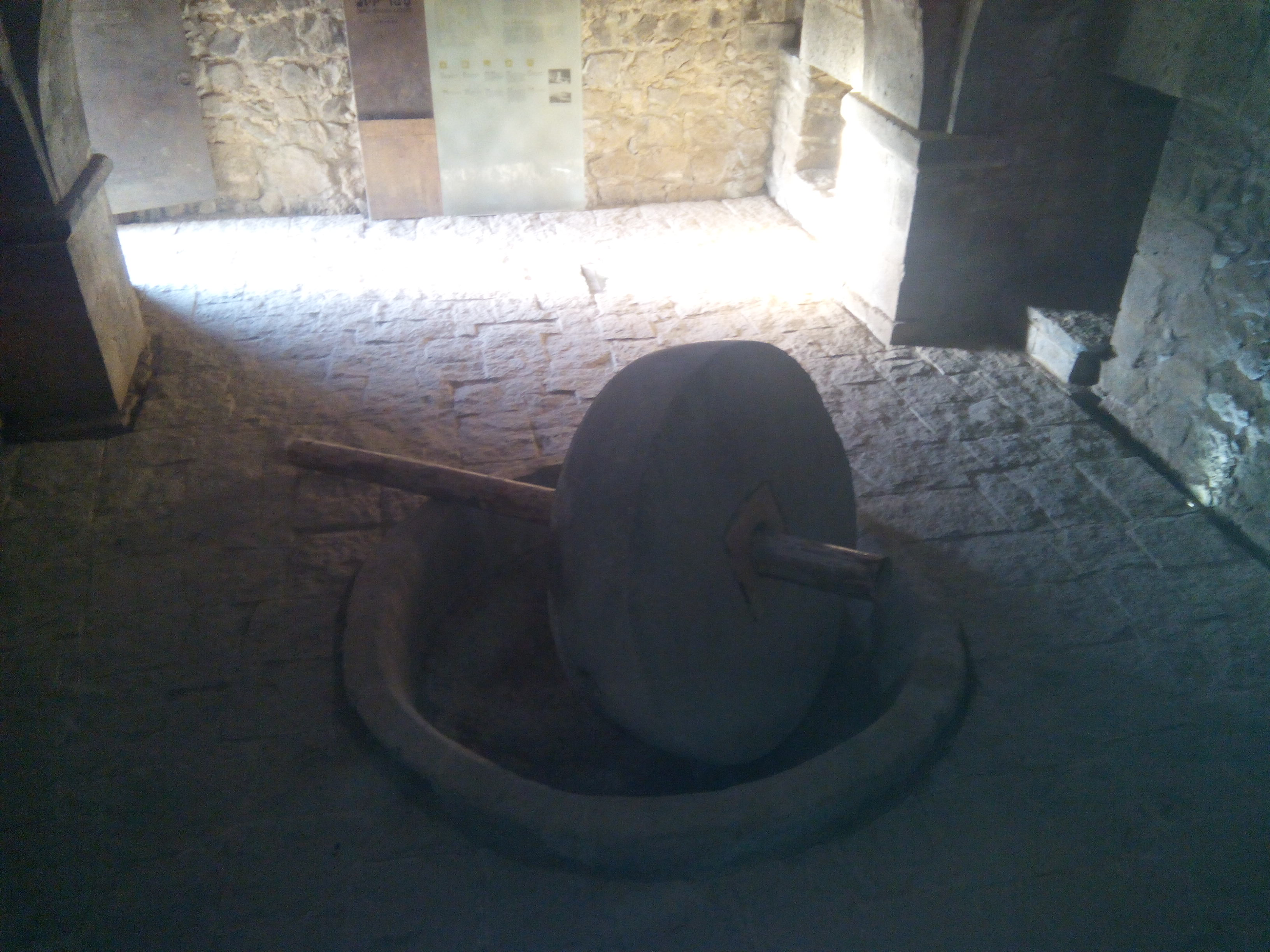 Տաթևի վանք: Ձիթհան 97/9.31